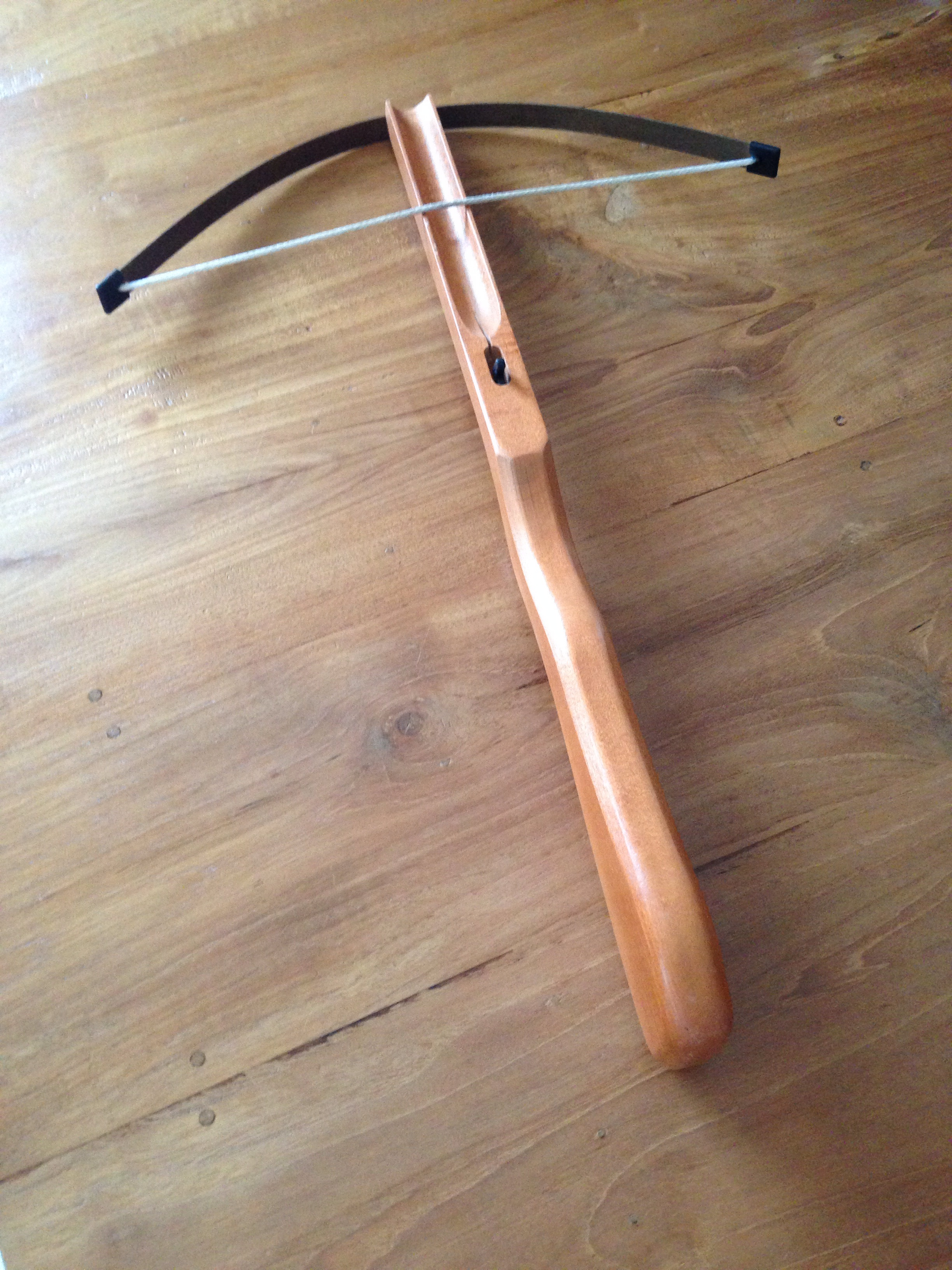 Kinder Armbrust